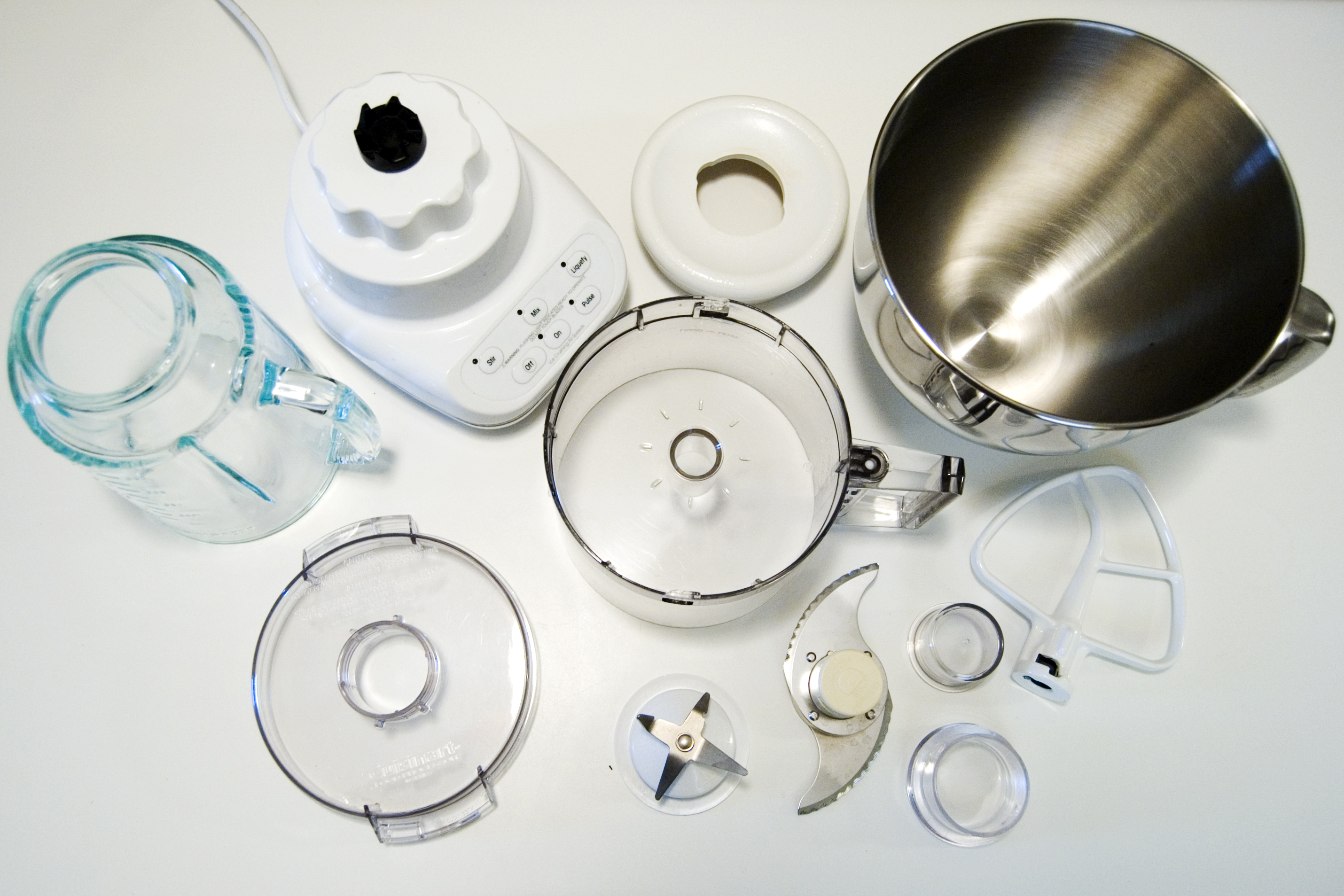 A household blender, disassembled.